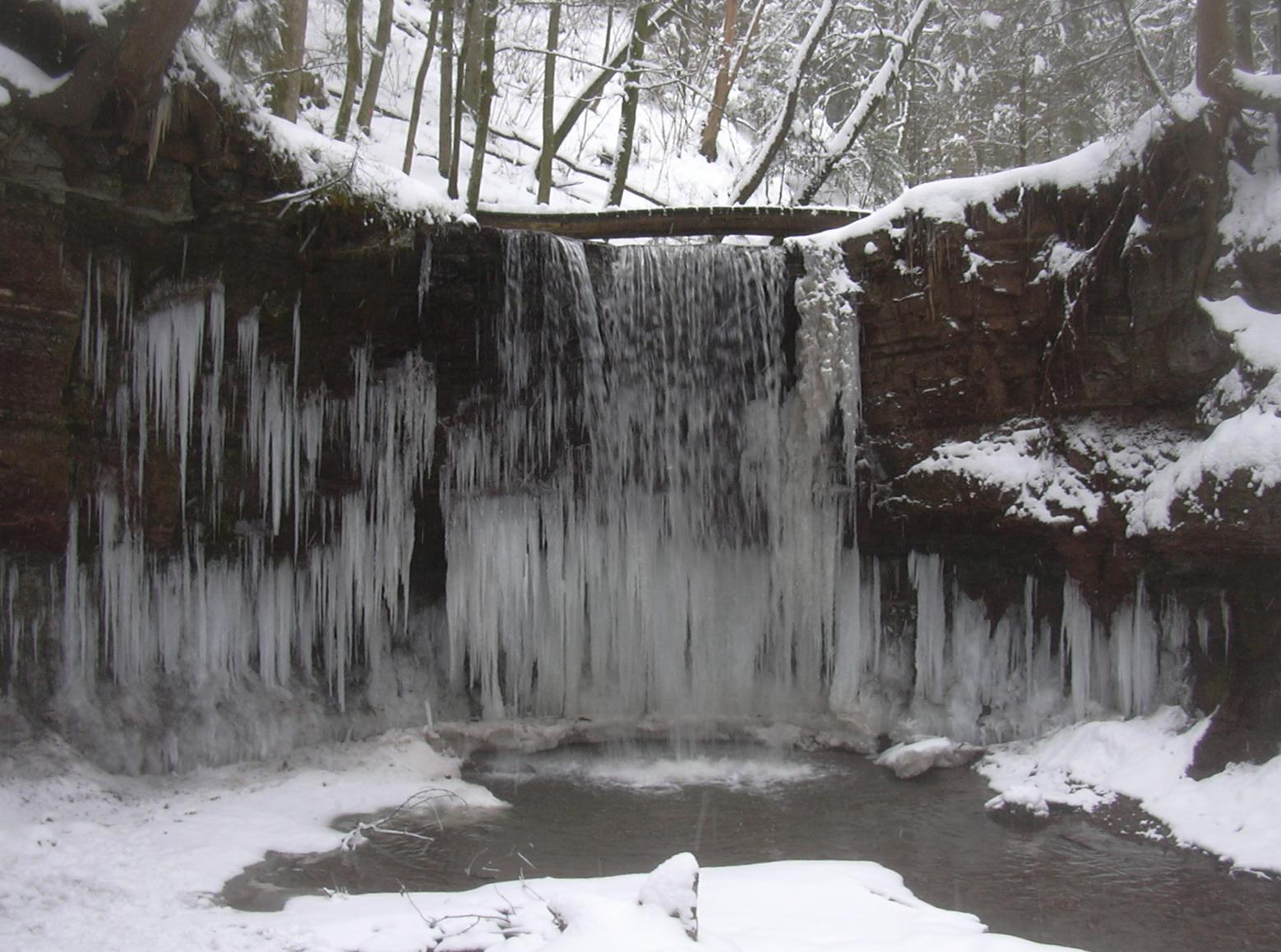 Vorderer Wasserfall des Hörschbachs im Winter; Bereich im NSG Hörschbachschlucht